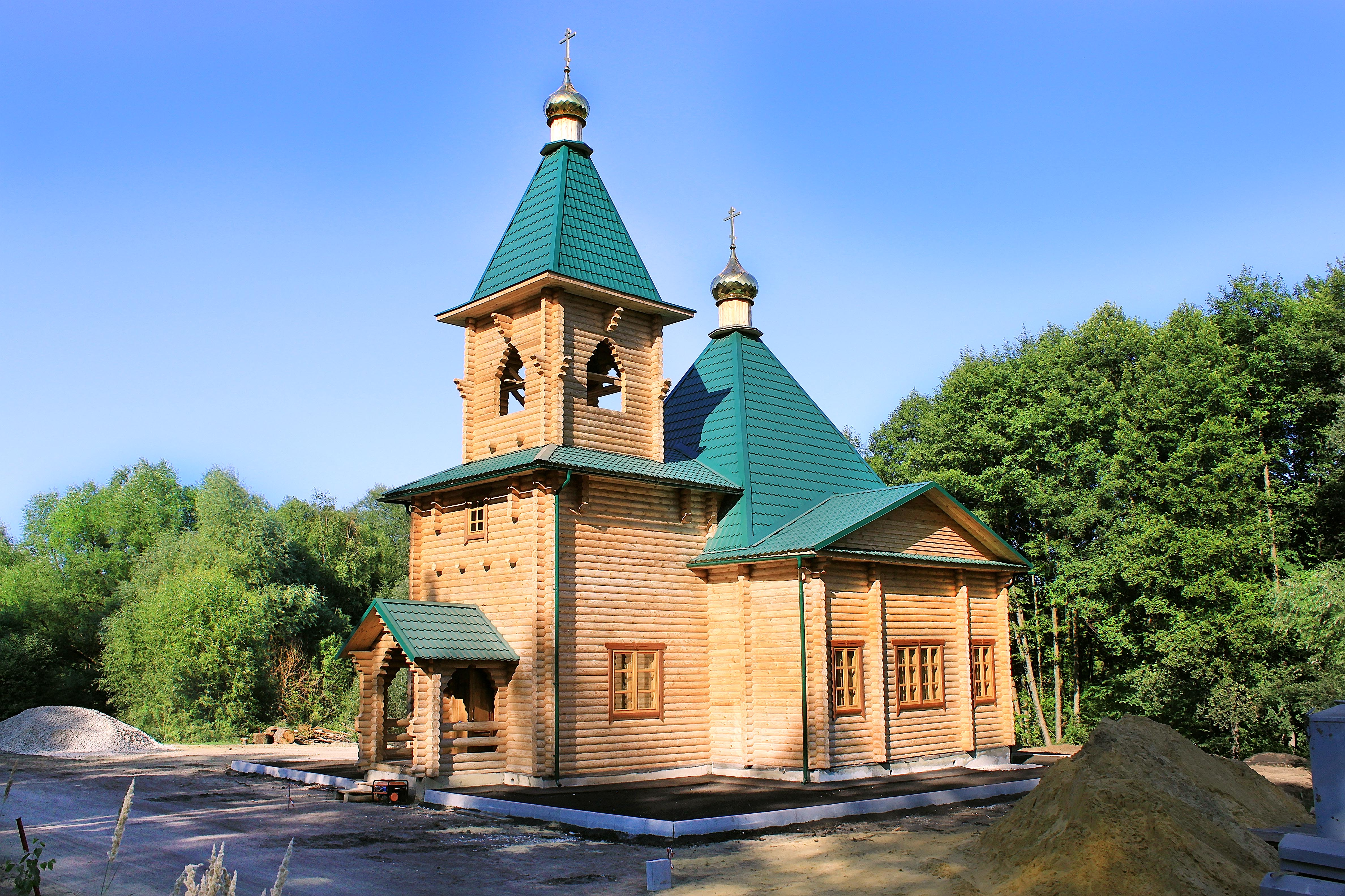 Семиключье, Пензенская область